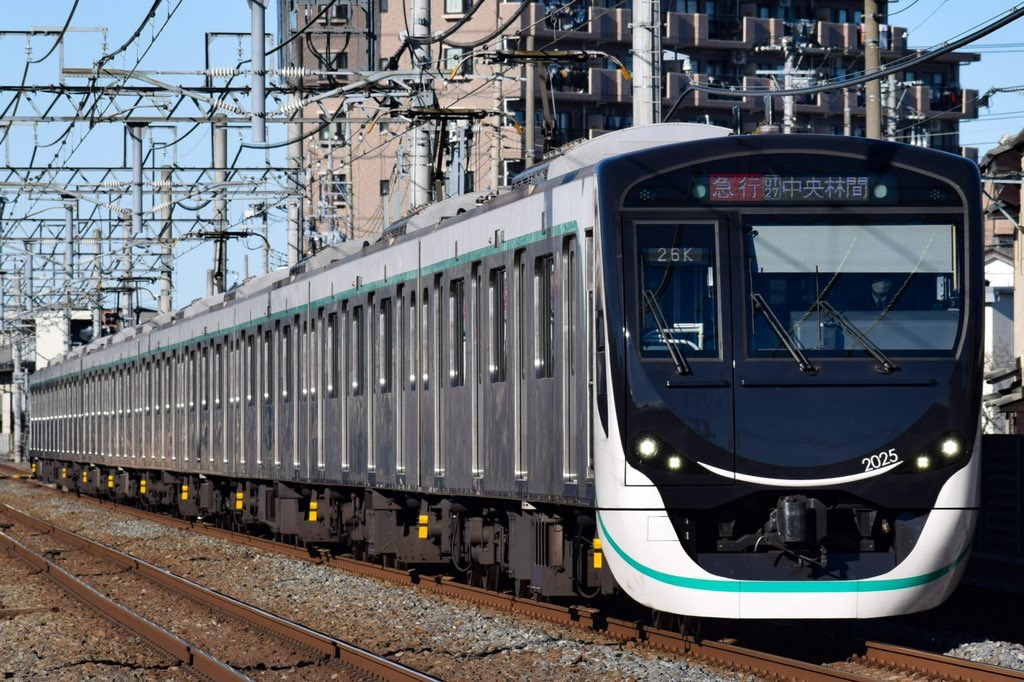 東急電鉄2020系2025編成 急行中央林間行き